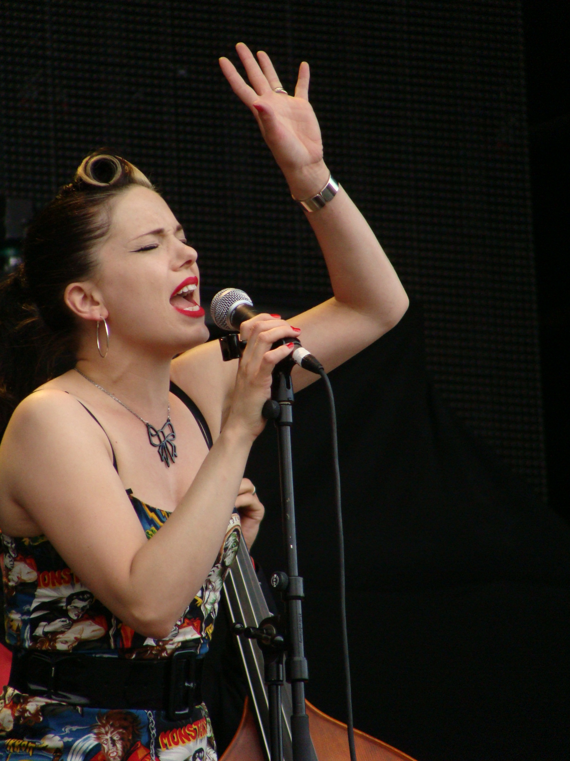 Imelda May